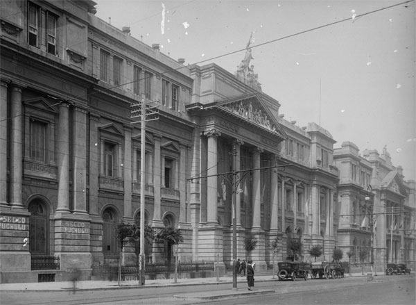 Vista de los dos edificios pertenecientes a la Facultad de Ciencias Médicas (hoy Facultad de Medicina) de la Universidad de Buenos Aires. El que está en primer plano aloja hoy en día a la Facultad de Ciencias Económicas. El que se ve hacia el fondo, fue demolido, y luego se construyó el anexo actual.